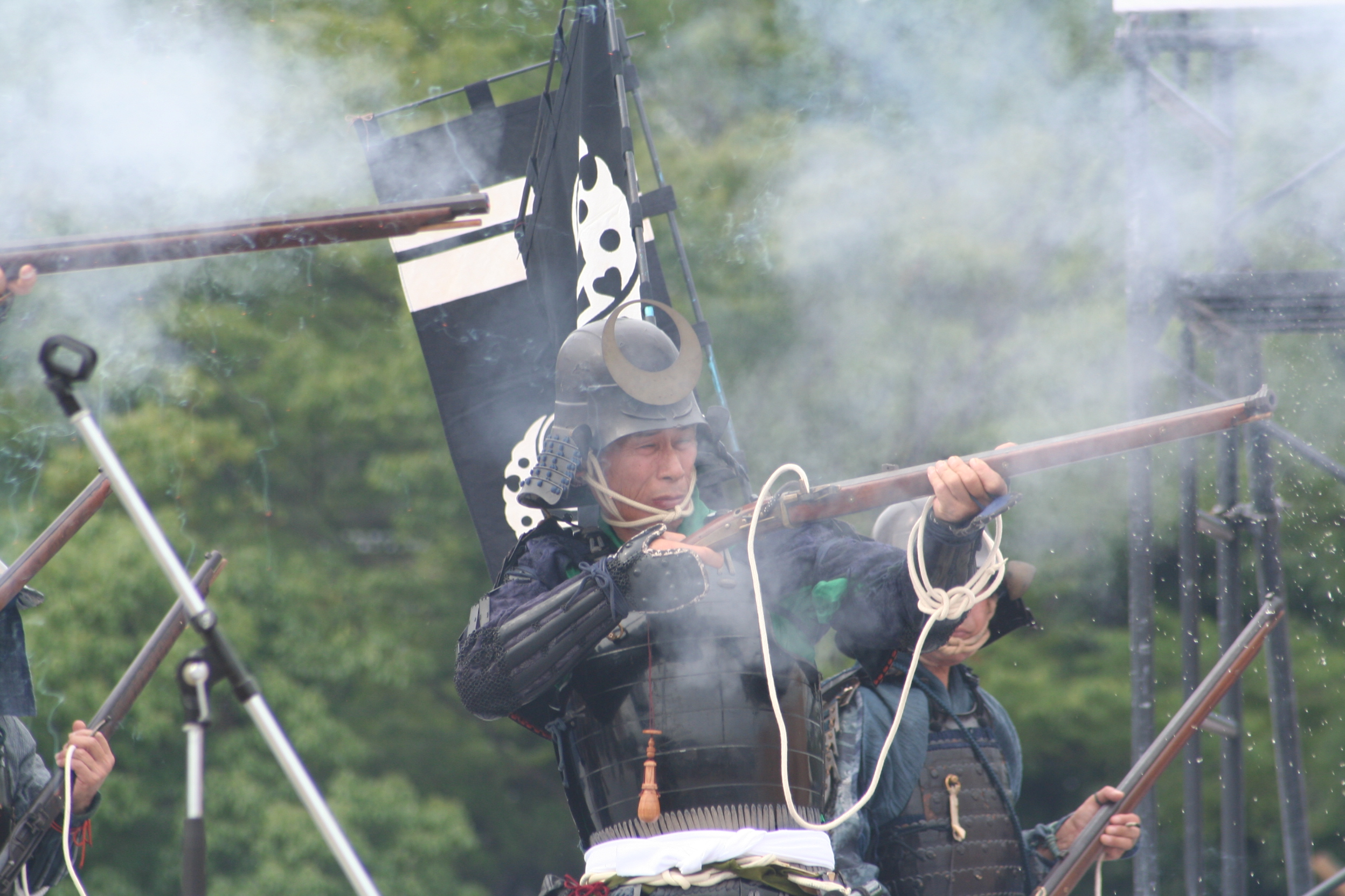 姫路お城祭。兵庫県姫路市にて毎年7月末から8月2日の3日間に渡り姫路城の南部大手前通りにて開催される祭である。第60回開催の2日目の祭の様子。